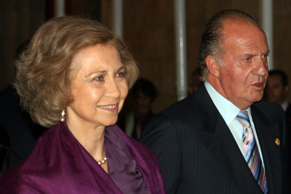 A Rainha Sofia e o Rei de Espanha, Juan Carlos